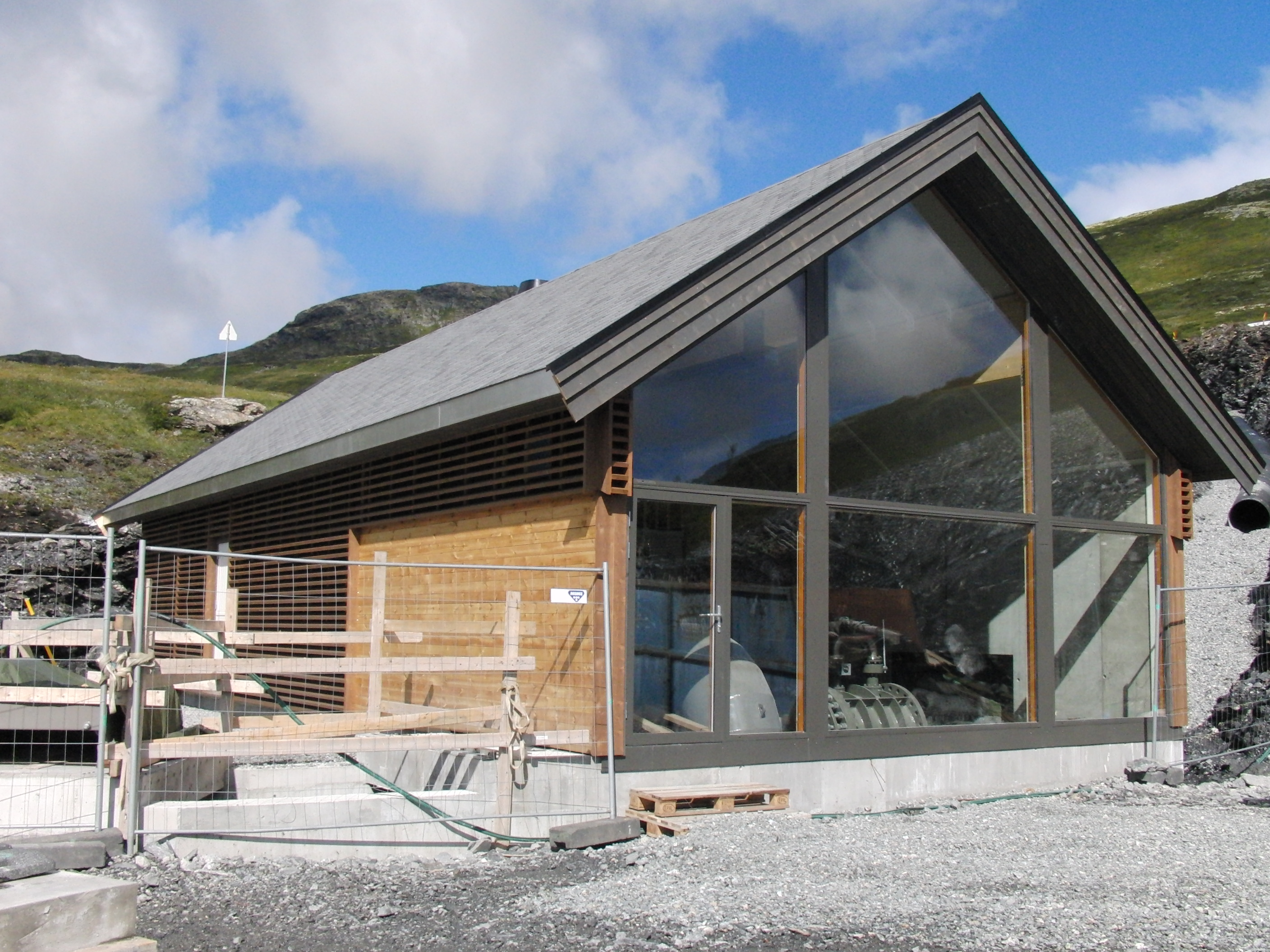 Mannsberg kraftverk, under bygging